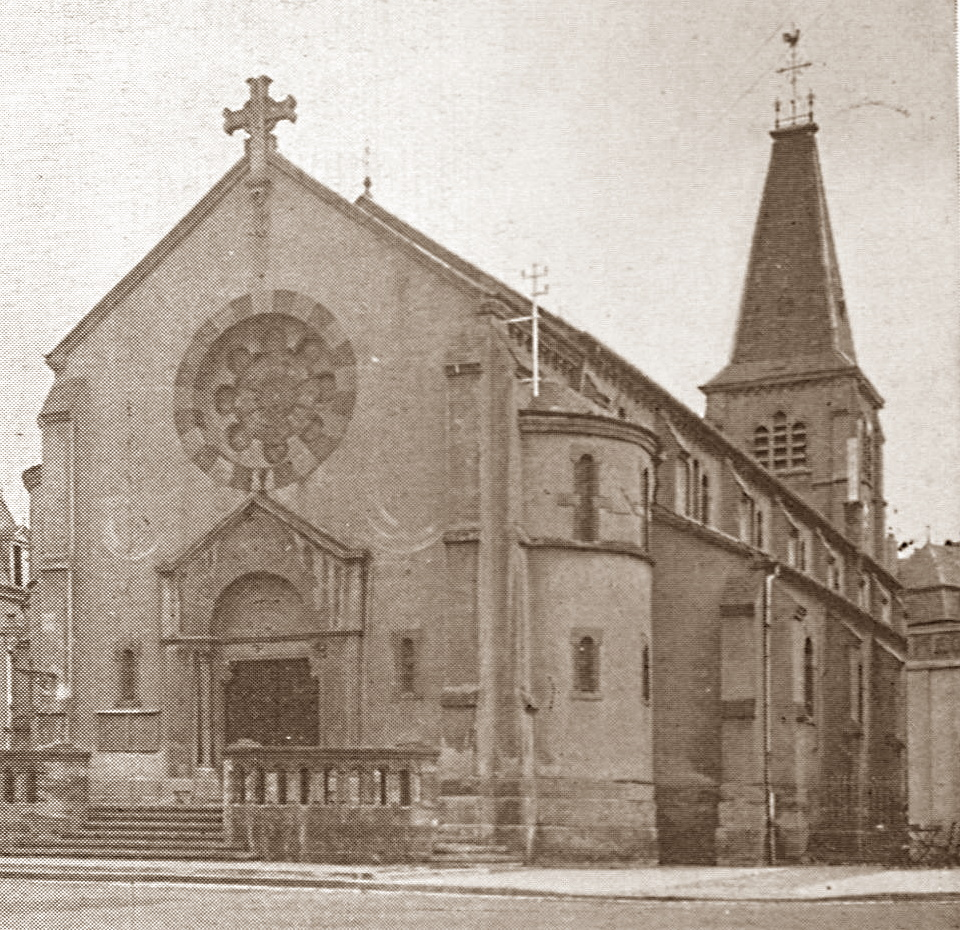 D'Jousefskierch vu Bouneweg aus dem Joer 1887/88, déi am Zweete Weltkrich zerstéiert gouf.